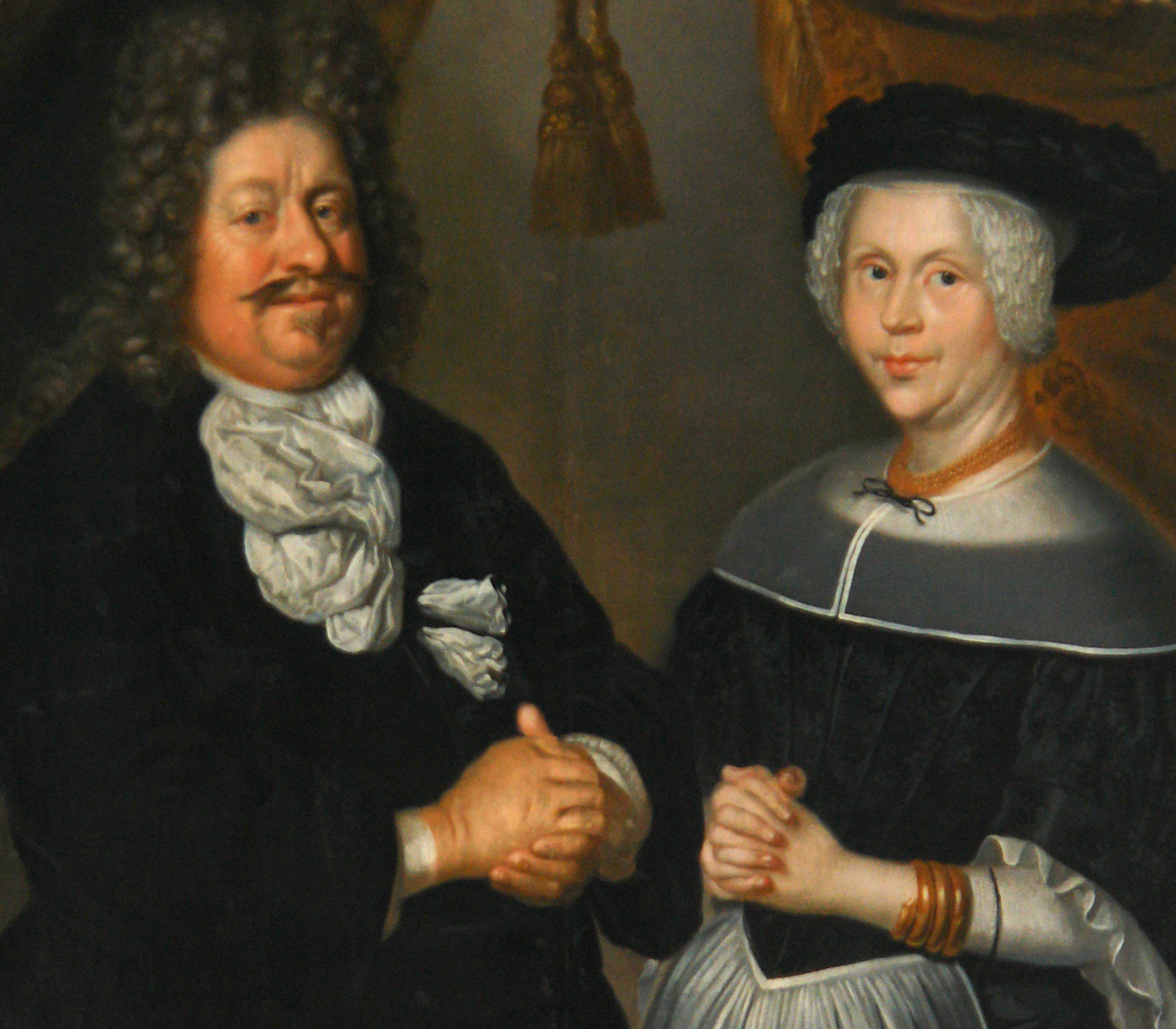 Kirche von Holstebro: Christen Christensen Linde (1626-1706) mit seiner Gattin Dorothea Nielsdatter (1639-1685). Das Bild stammt aus dem Epitaph, bei dem 1982 bei der Restaurierung darunter ein jüngeres Bild gefunden wurde. Es hängt jetzt an der linken Wand neben dem Epitaph. (Aufnahme perspektivisch entzerrt)